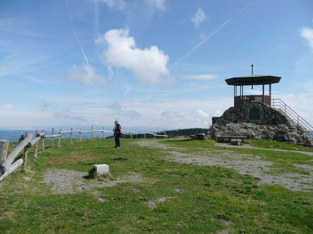 Kandel (1241 m): Gipfelplateau mit Kandelpyramide